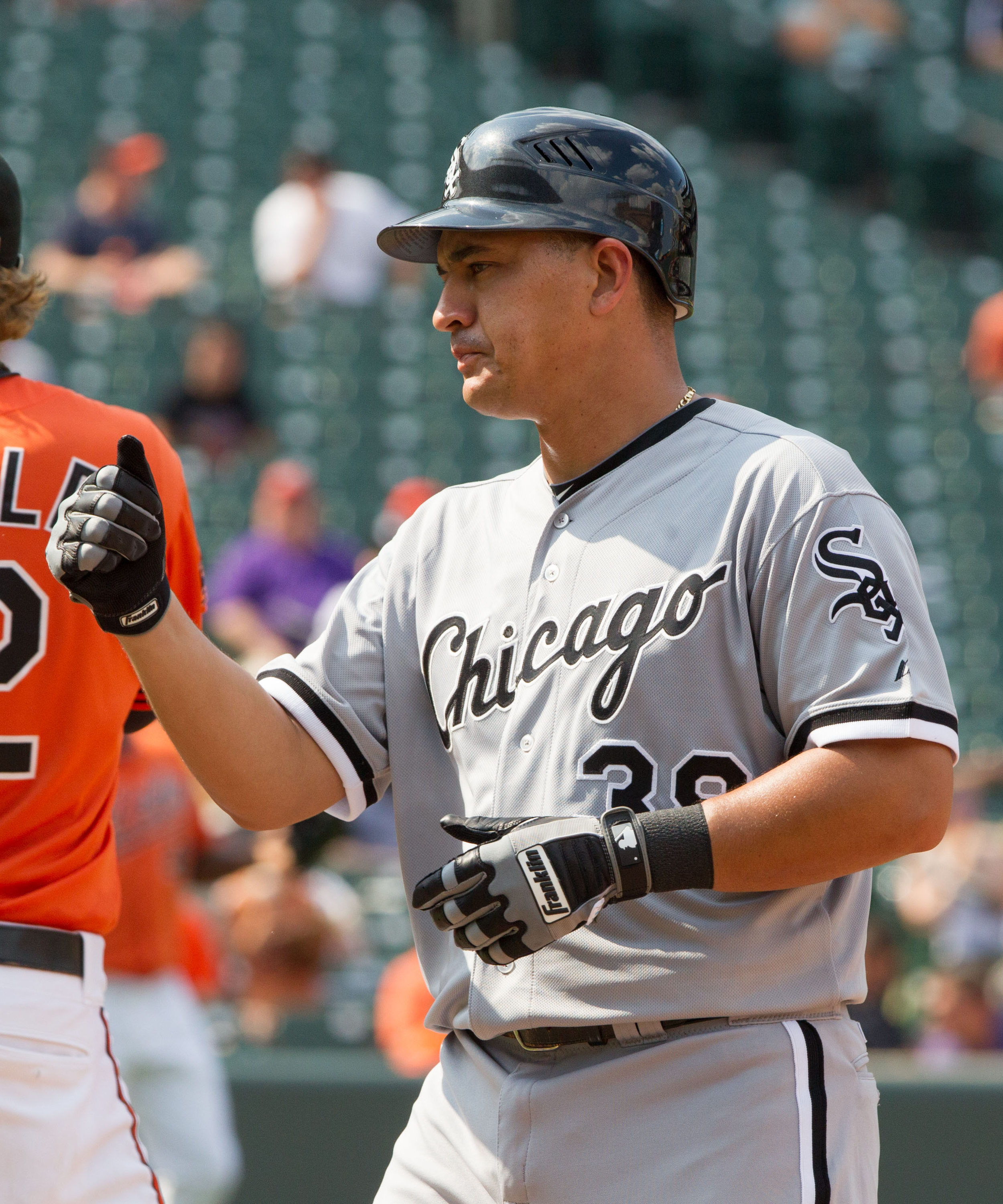 Héctor Giménez